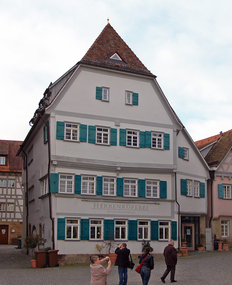 Gasthof Herrenküferei (zuvor Ratsstüble) am Markgröninger Marktplatz, erbaut im frühen 15. Jahrhundert